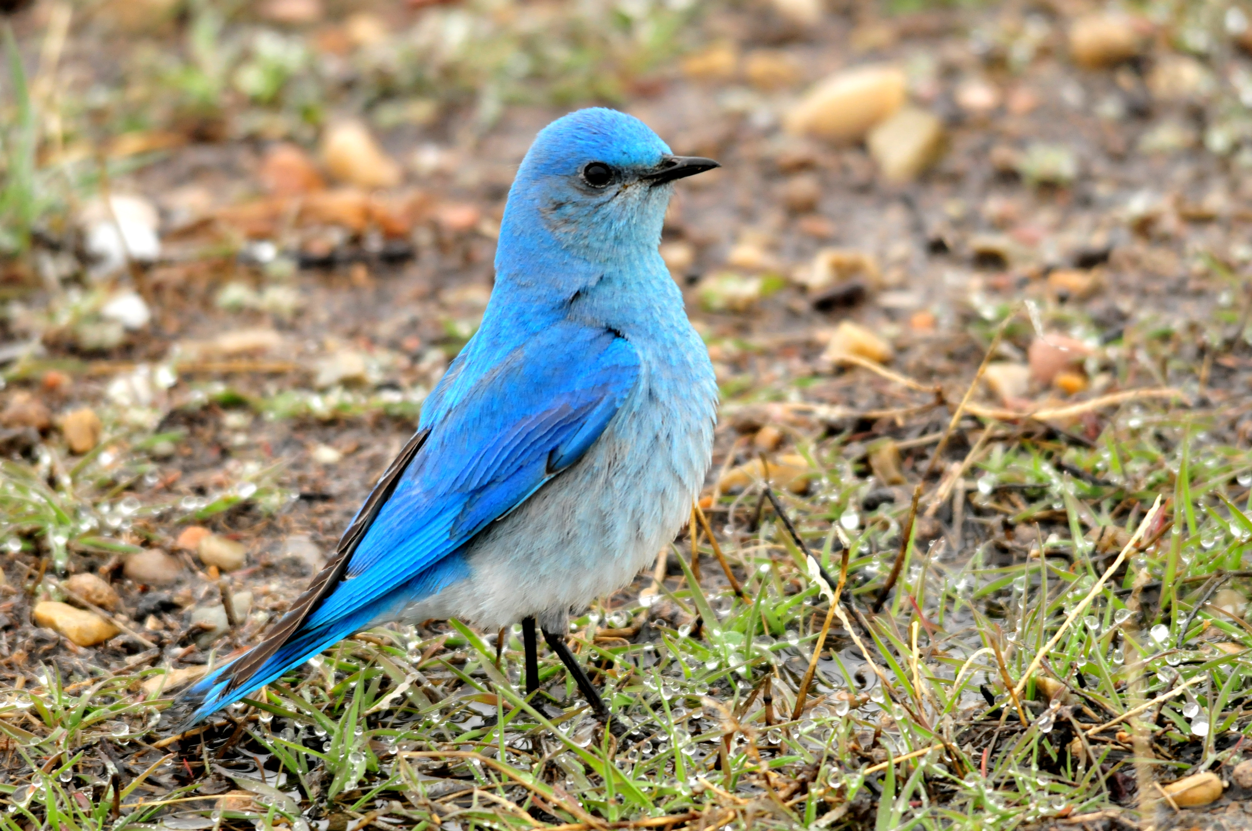 Photo: Tom Koerner/USFWS